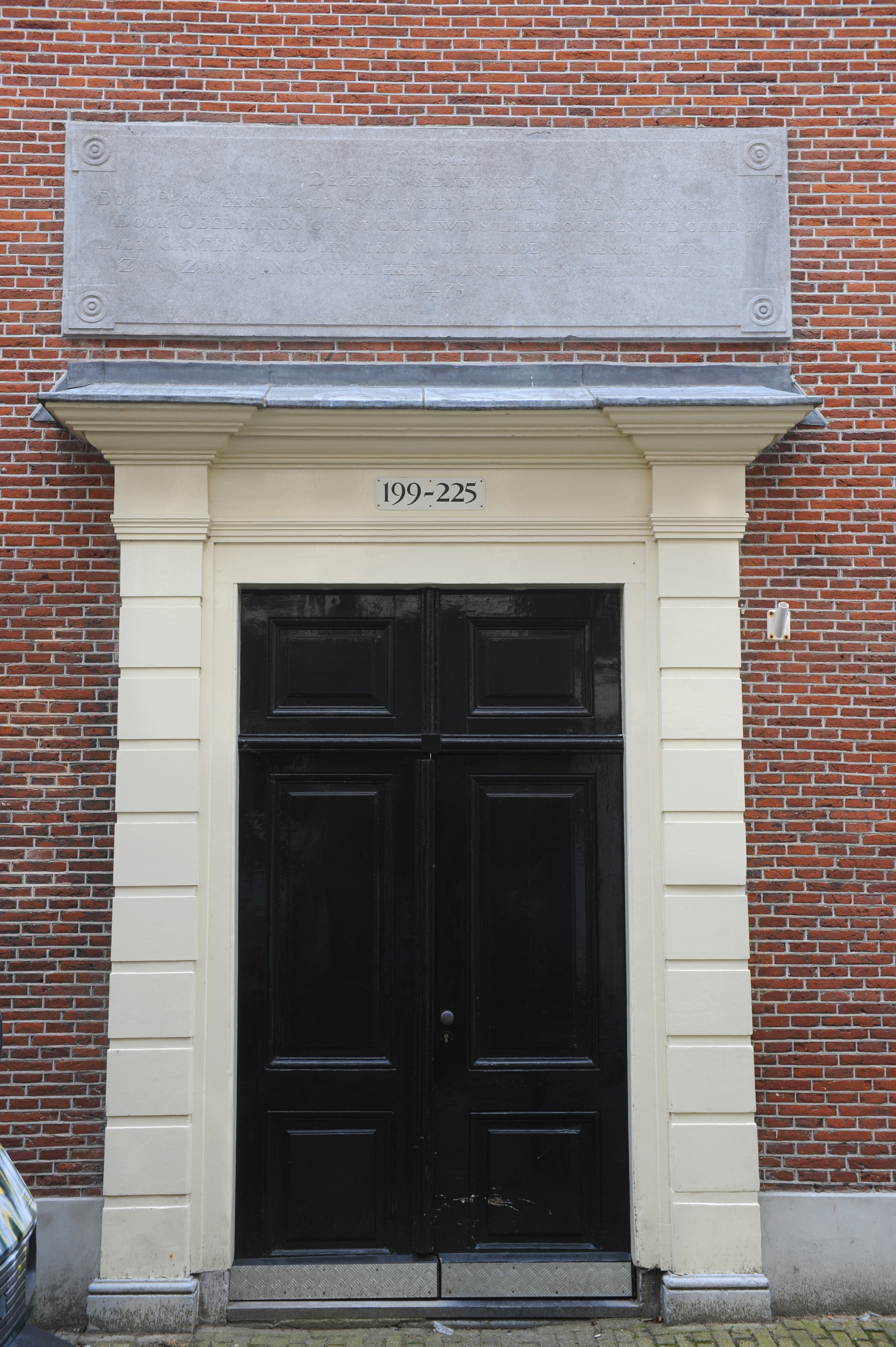 Poort Hofje De Zeven Keurvorsten Tuinstraat 199 Amsterdam